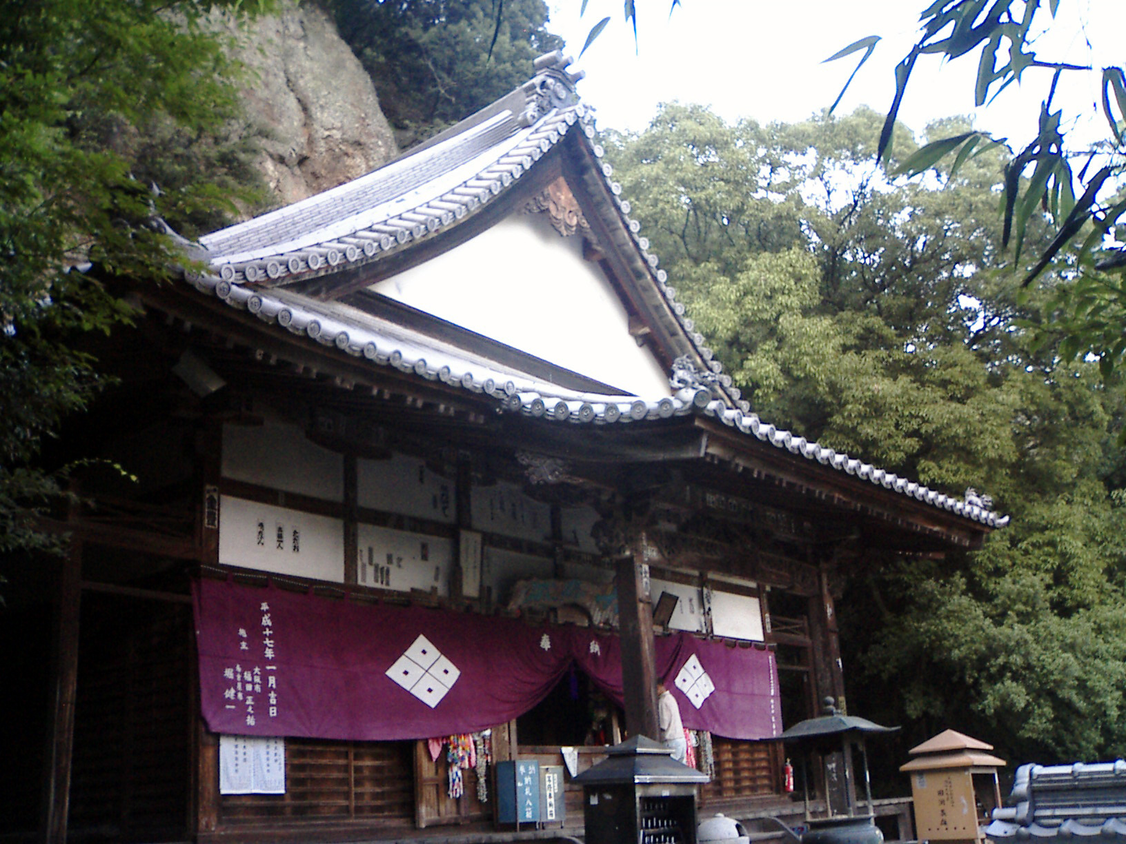 弥谷寺本堂 - 日本国香川県三豊市